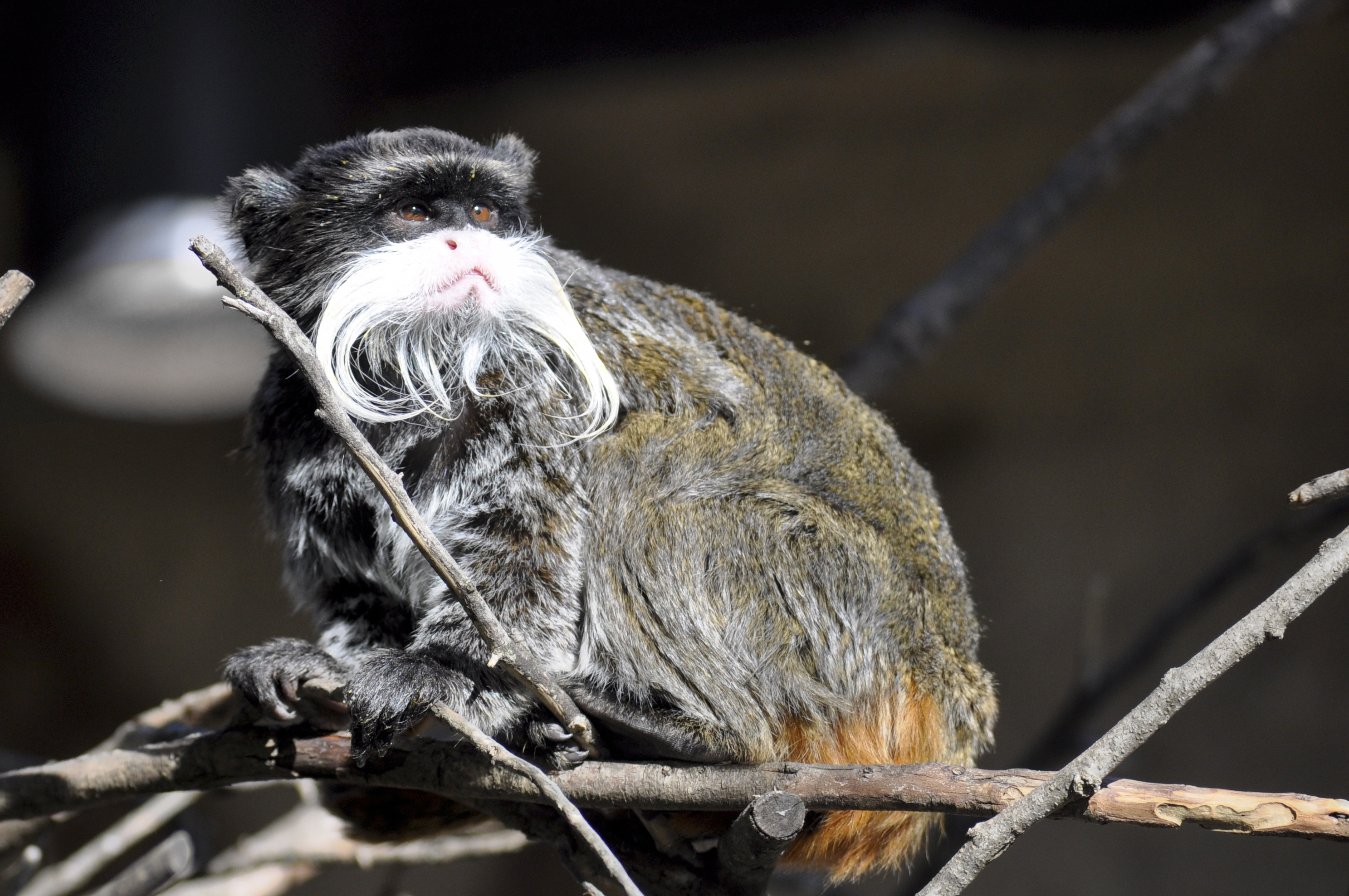 Uno de los ejemplares de Tamarino Emperador que se puede ver actualmente en el Zoo de Jerez